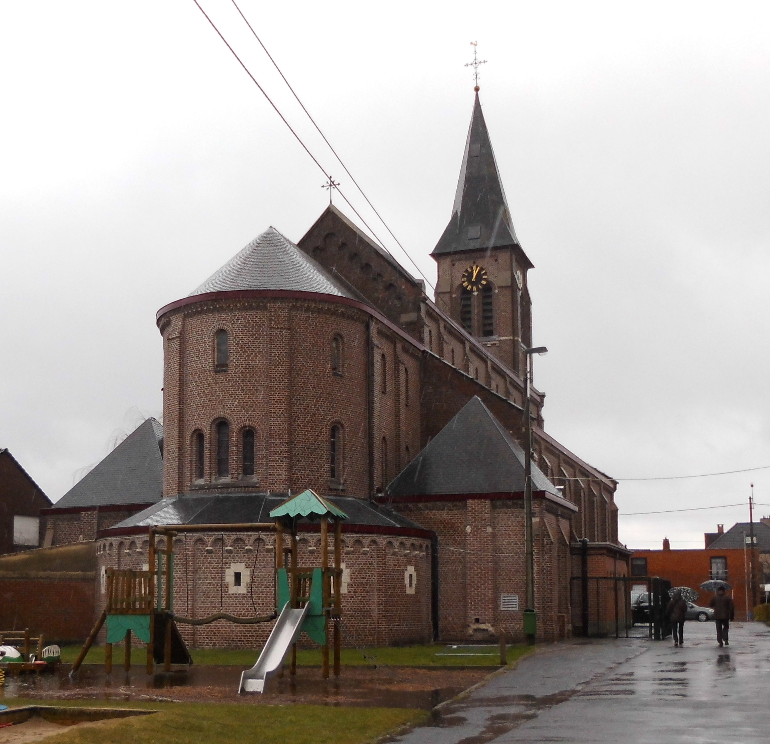 Sint-Katharinakerk - Sint-Katrienplein - Kuurne - West-Vlaanderen - België